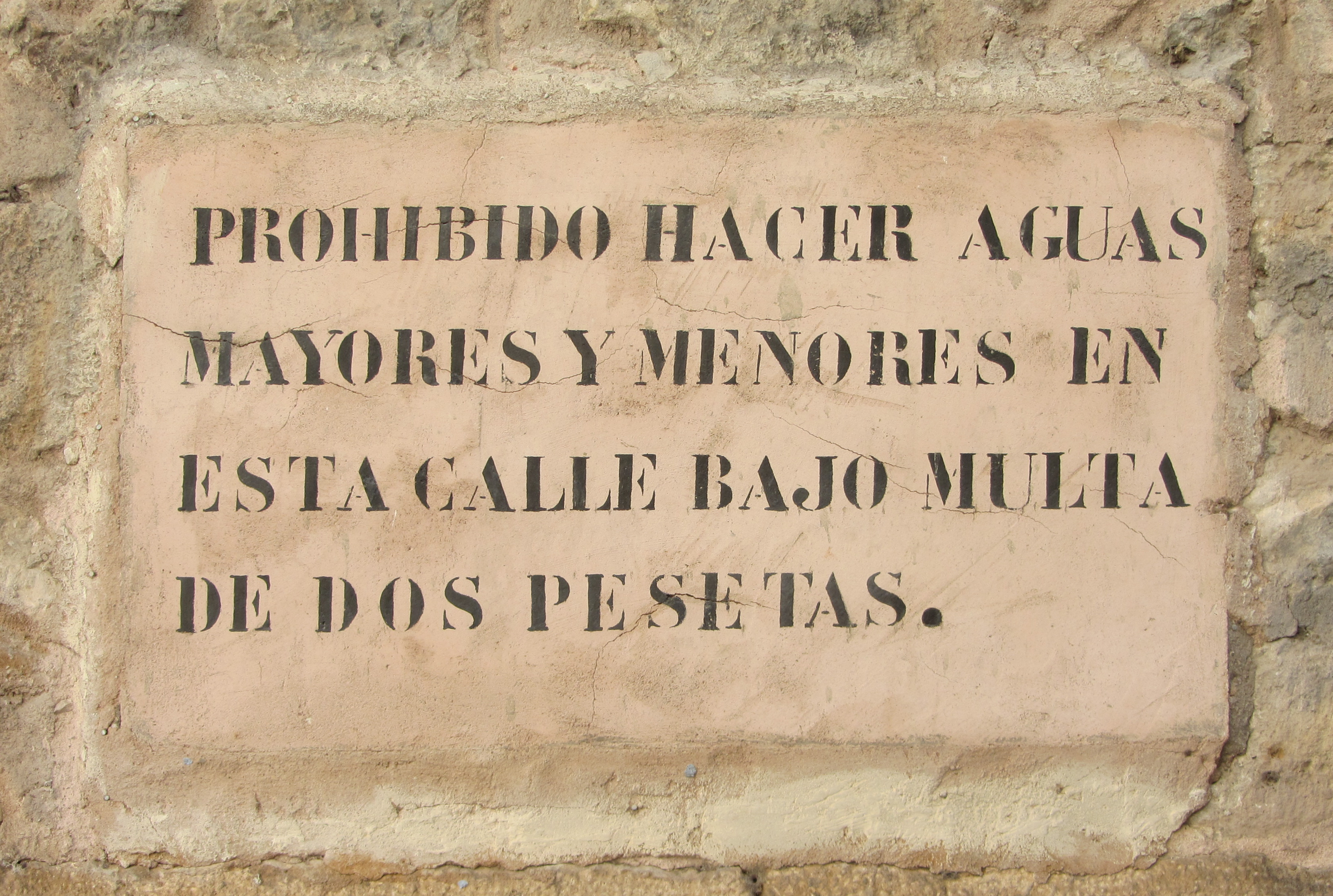 Lápida en la calle Lope Tablada de Diego (Sepúlveda - Segovia) prohibiendo defecar y orinar en la vía pública como medida de higiene pública.